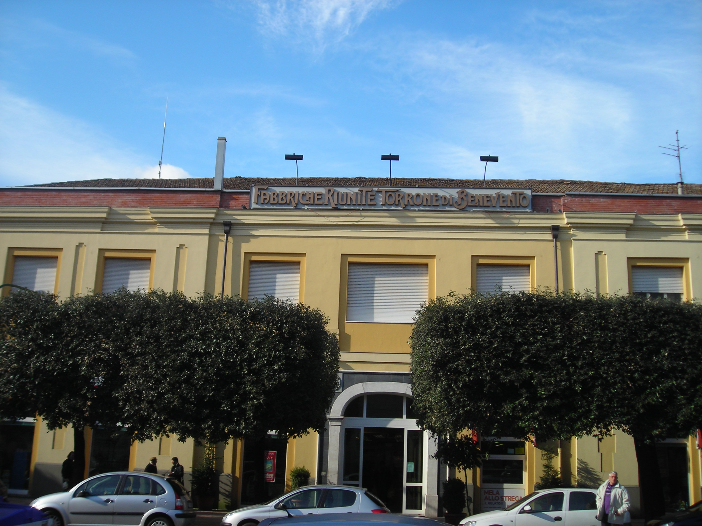 La sede delle Fabbriche Riunite Torrone di Benevento